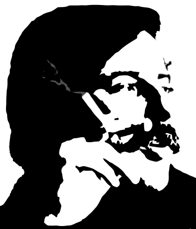 Miguel Humberto Enríquez Espinosa (* Talcahuano, 27 de marzo de 1944 - † Santiago, 5 de octubre de 1974) fue un médico y político chileno. Fue el Secretario General del Movimiento de Izquierda Revolucionaria (MIR de Chile) desde 1967 hasta su muerte en octubre de 1974.